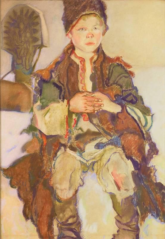 Казимир Сіхульський "Гуцульський хлопчик